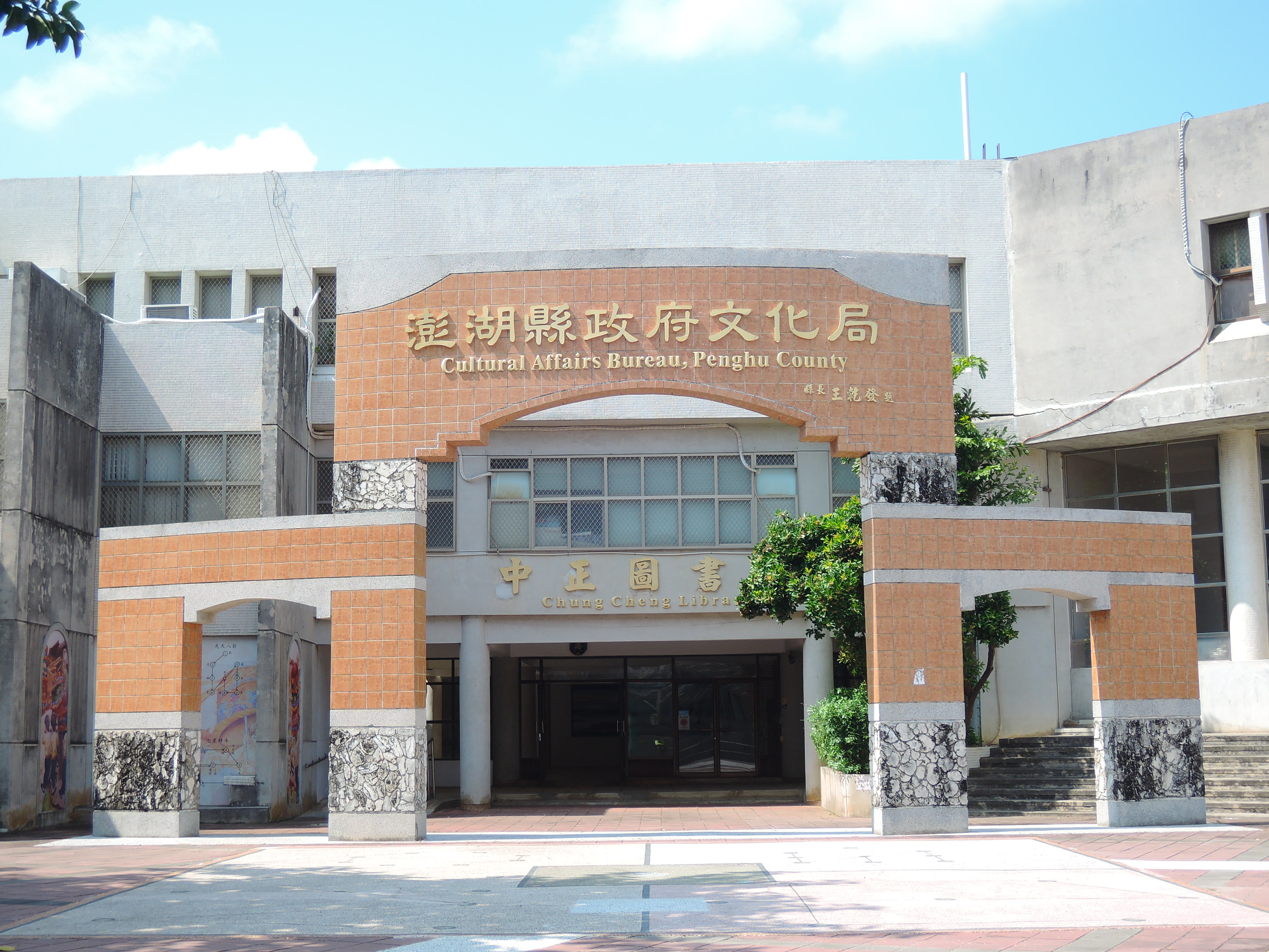 台灣澎湖縣文化局暨圖書館